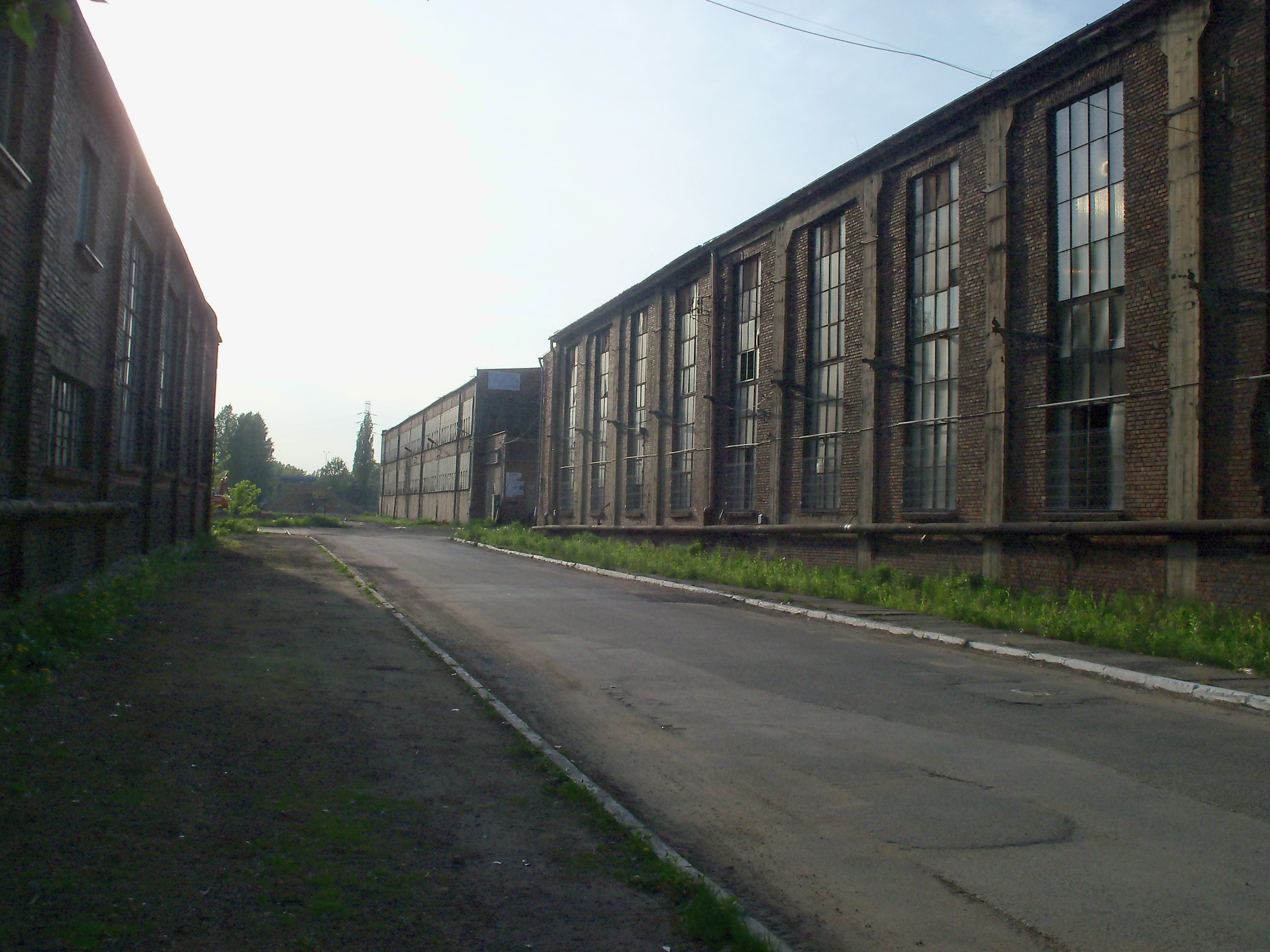 Huta Baildon w Katowicach